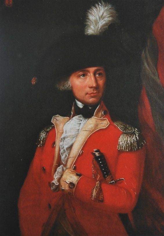 Portrait des norwegischen Diplomaten und Gouverneurs der dänischen Kolonie Tranquebar in Ostindien Peter Anker (1744-1832) gemalt von Niels Gude.